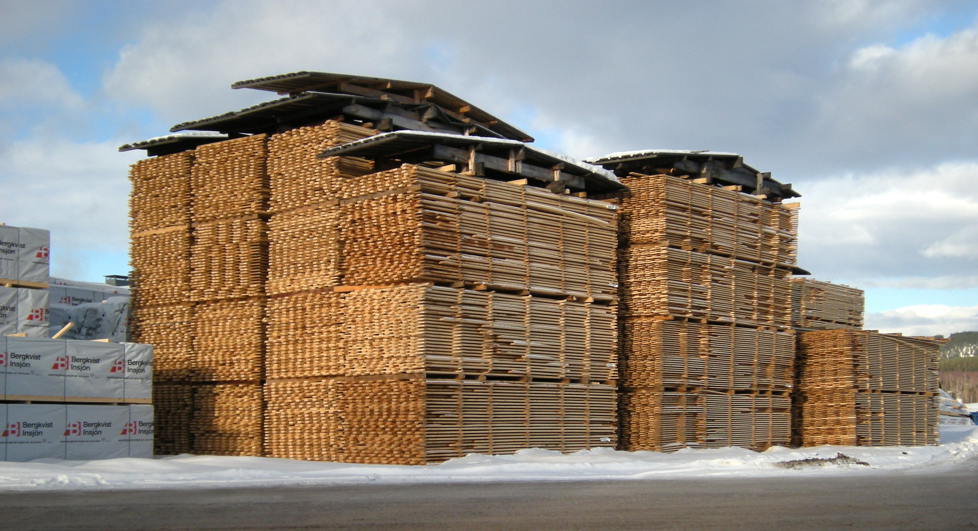 Virke vid Bergkvist-Insjön.